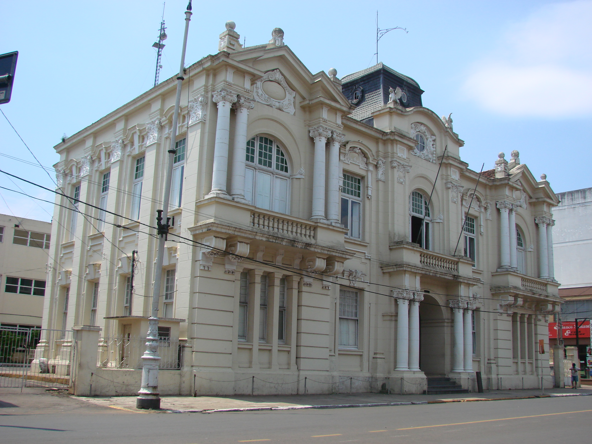 Fachada da Prefeitura de Cruz Alta.